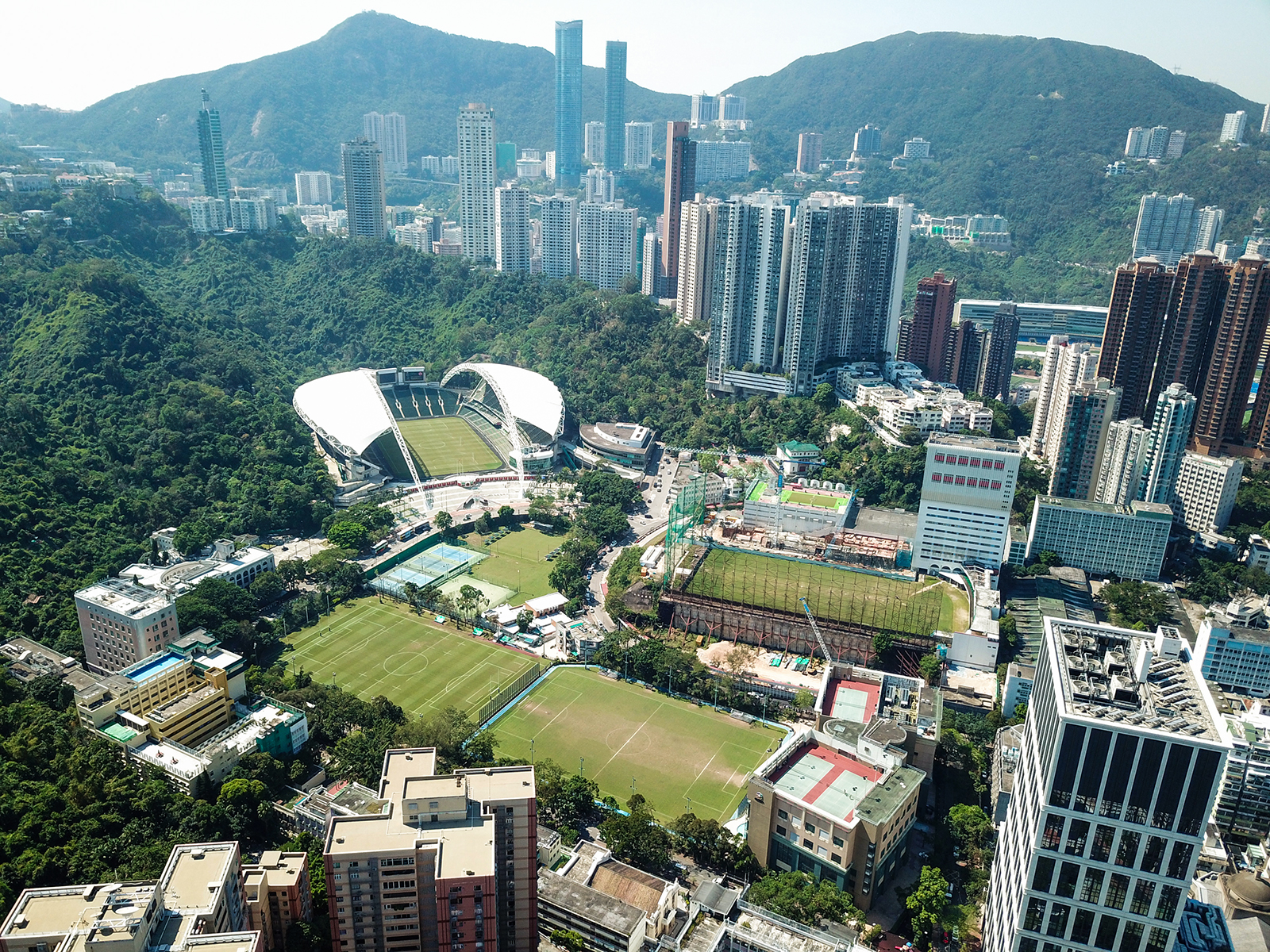 So Kon Po